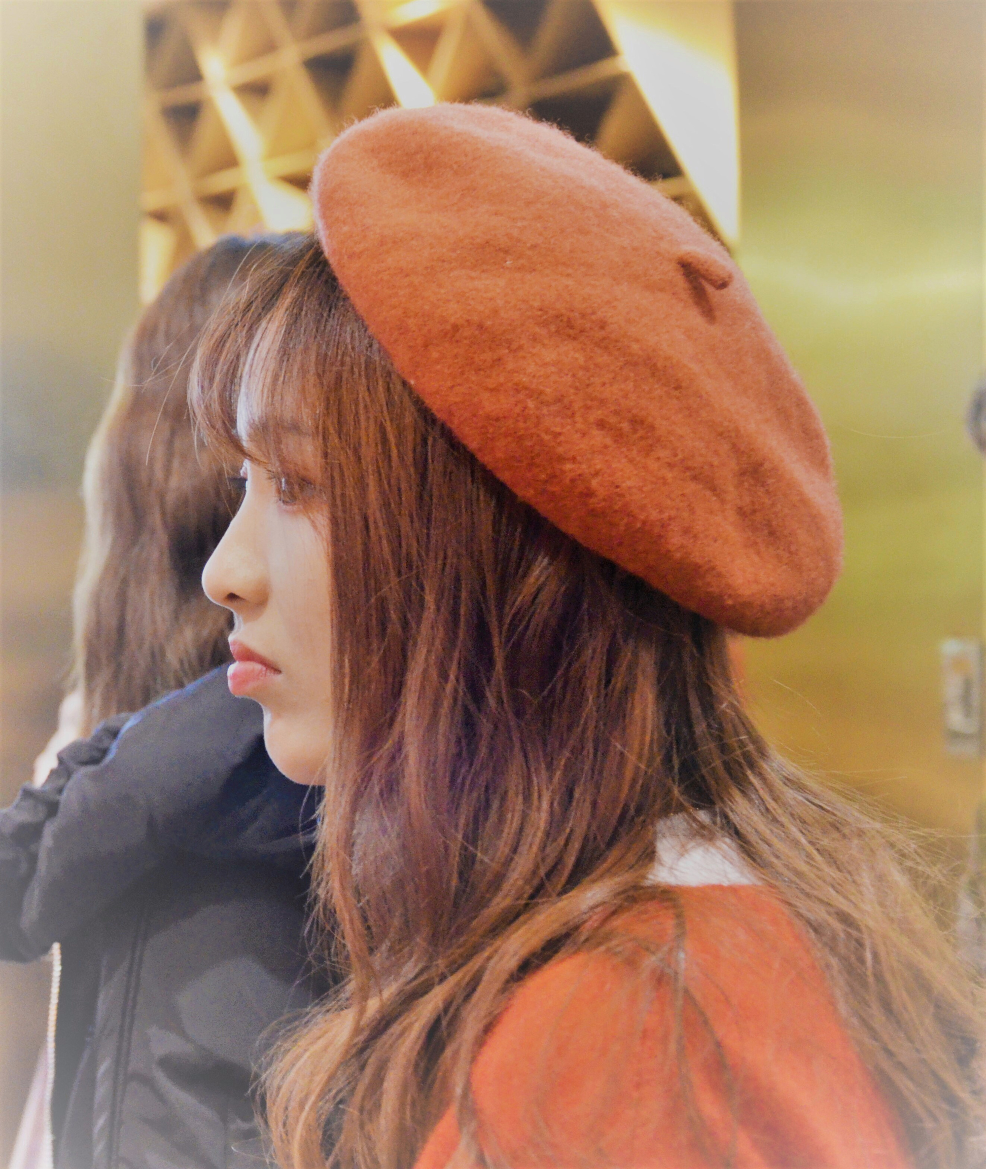 2017-12-10 734悠唐握手会下班